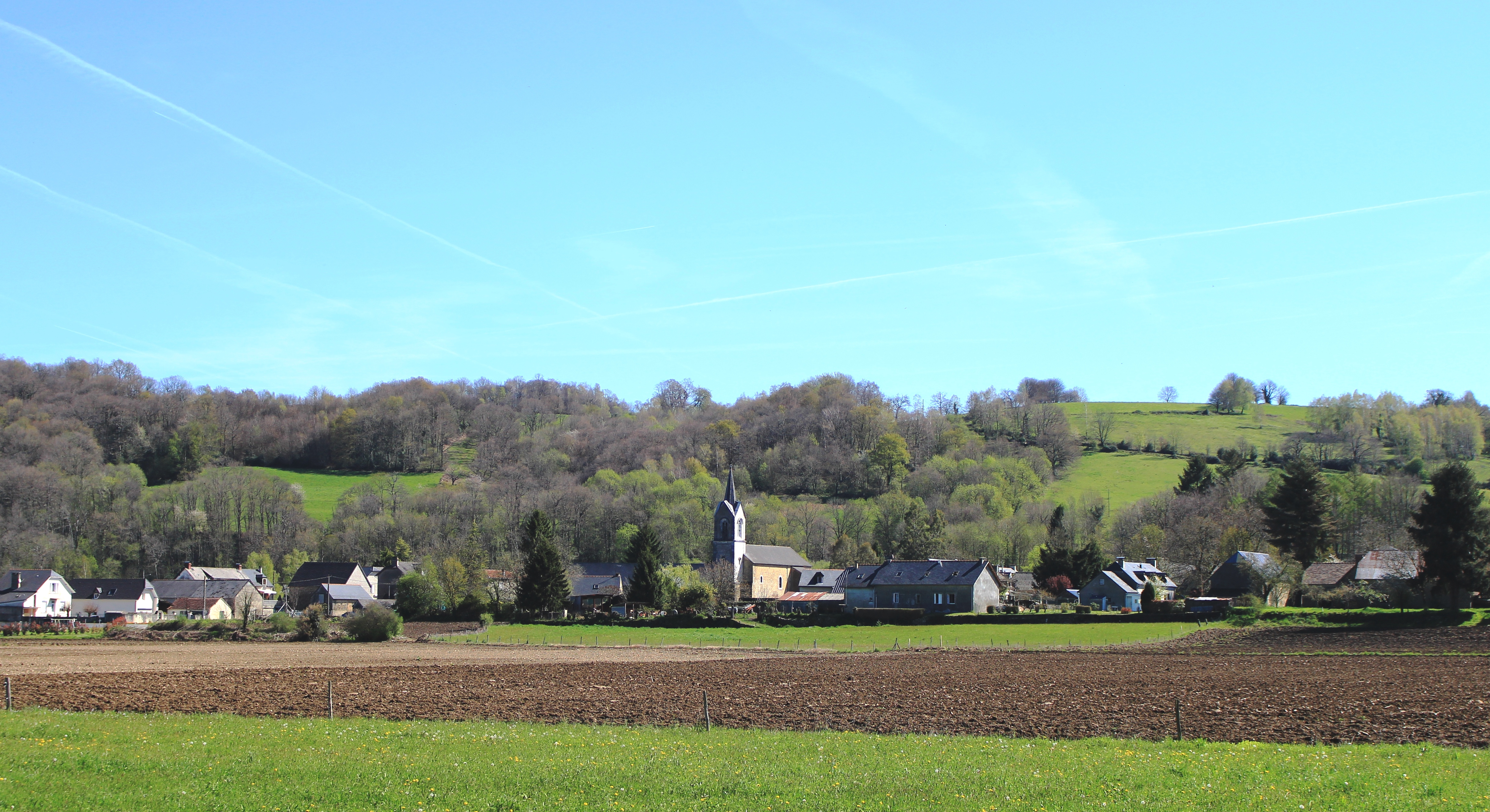 Barlest (Hautes-Pyrénées)